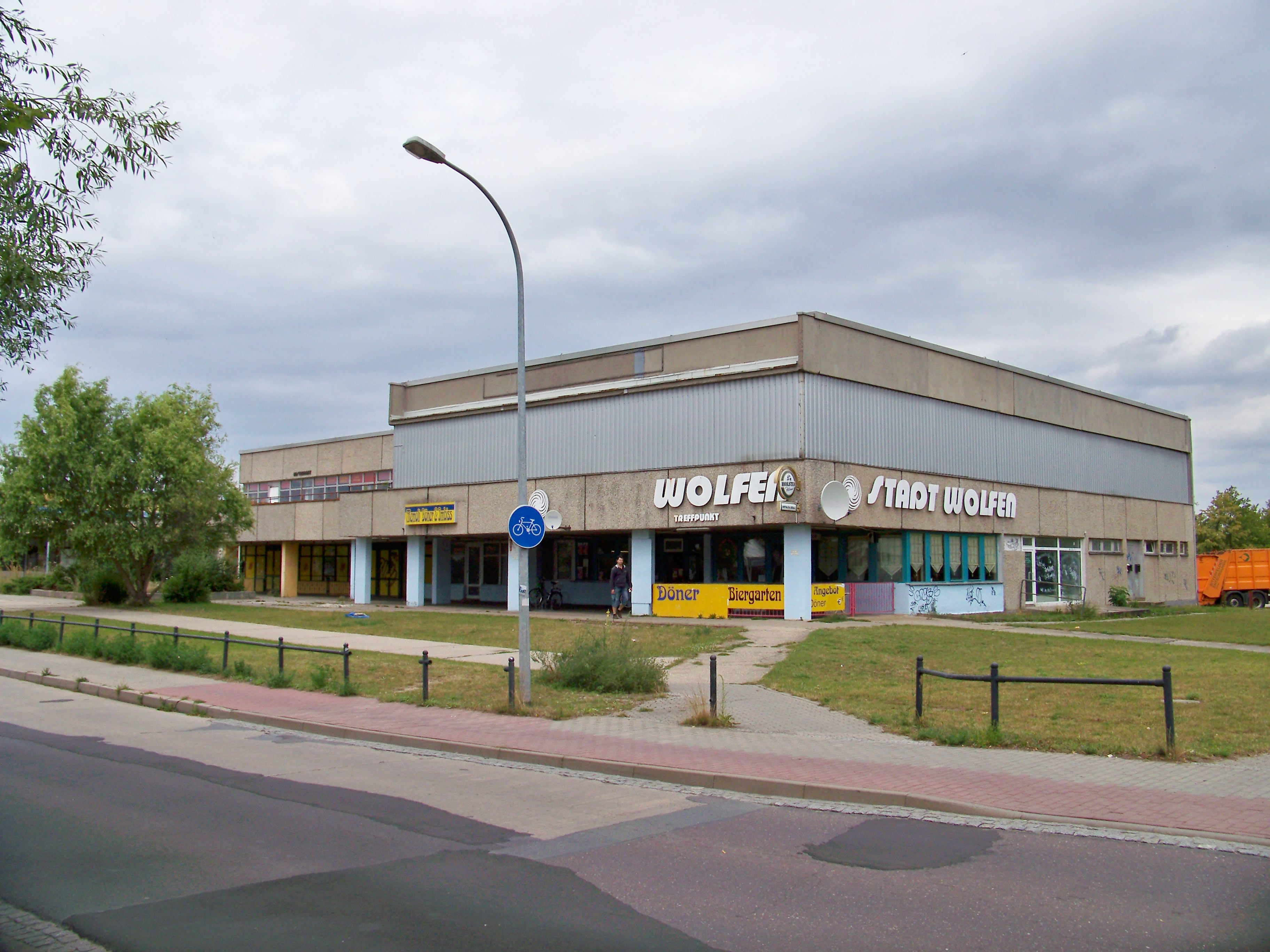 ehemaliges Lokal Stadt Wolfen in Wolfen-Nord